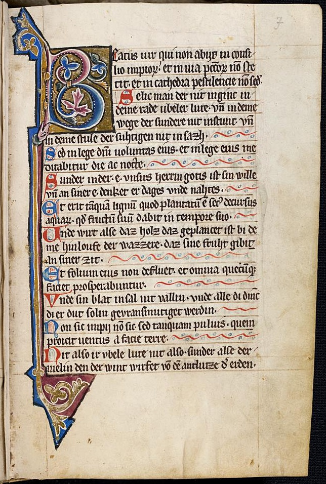 Codex Lichtenthal 37, aus dem Wormser Kloster Kirschgarten, von der Nonne Anna von Bolanden (+ 1320) stammend, Titelblatt des Psalters.